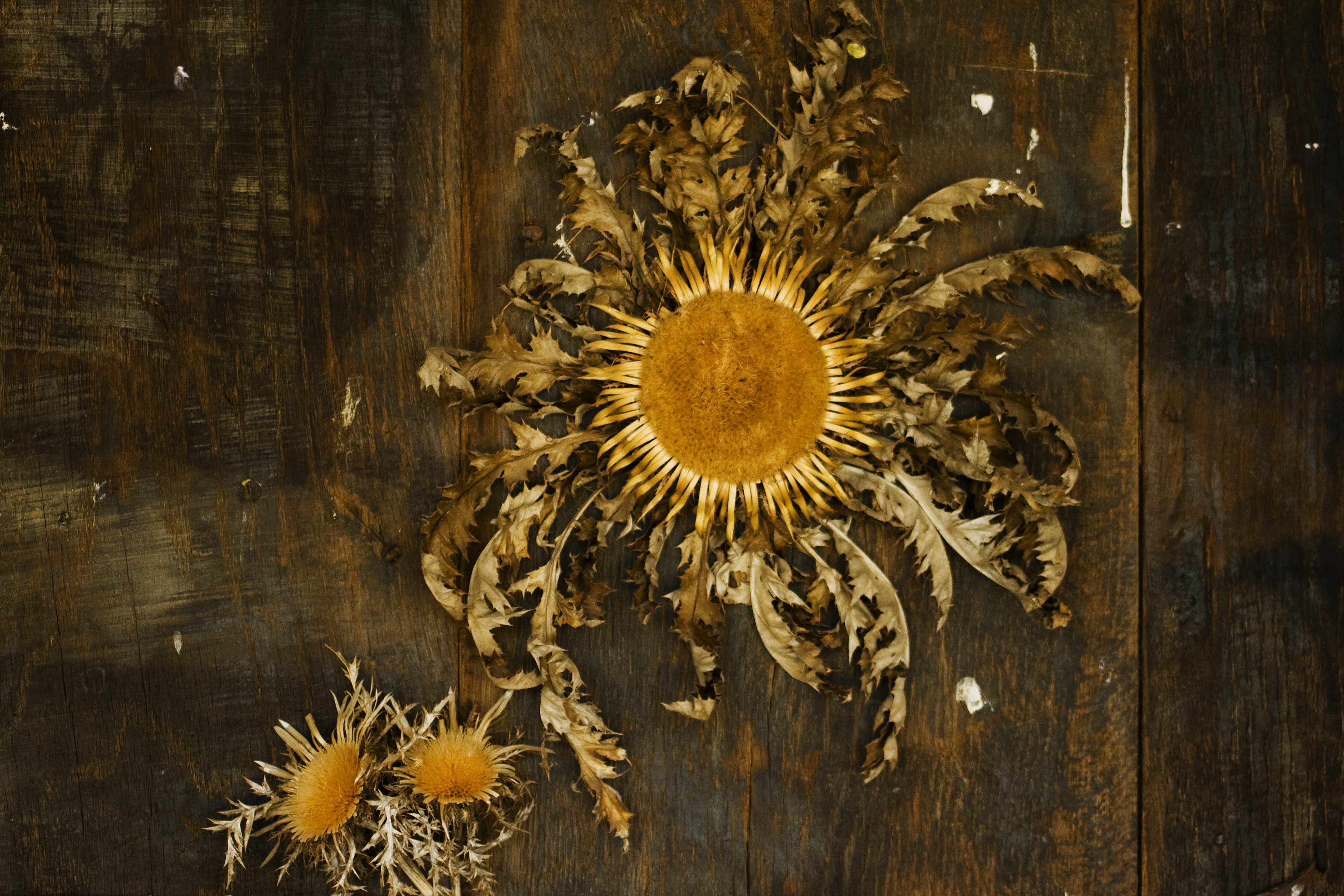 Eguzkilorea. Senpere, Lapurdi. Euskal Herria. Stemless carline thistle or Silver thistle. Saint-Pée-sur-Nivelle, Labourd. Basque Country.